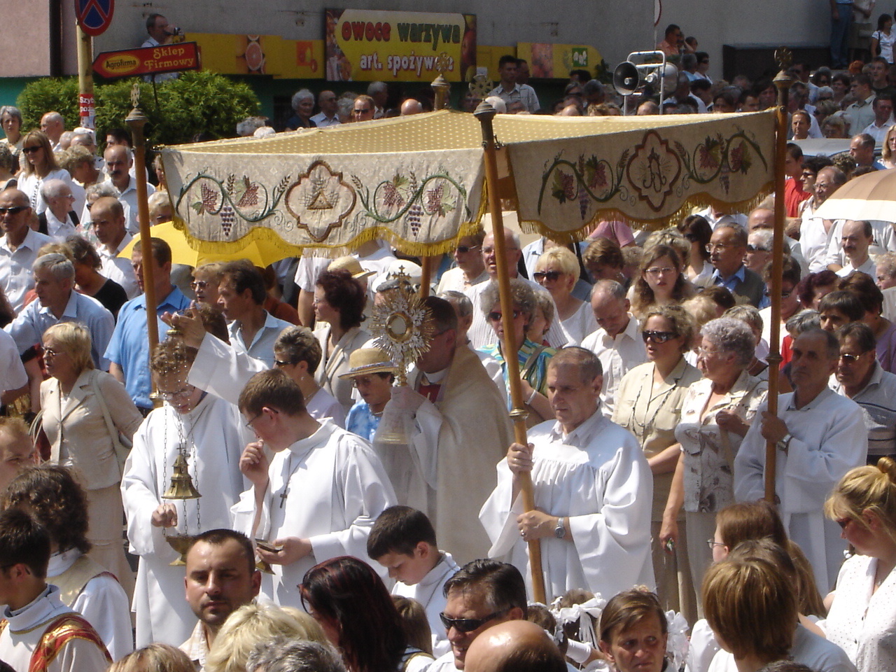 احتفال في ايرلندا.